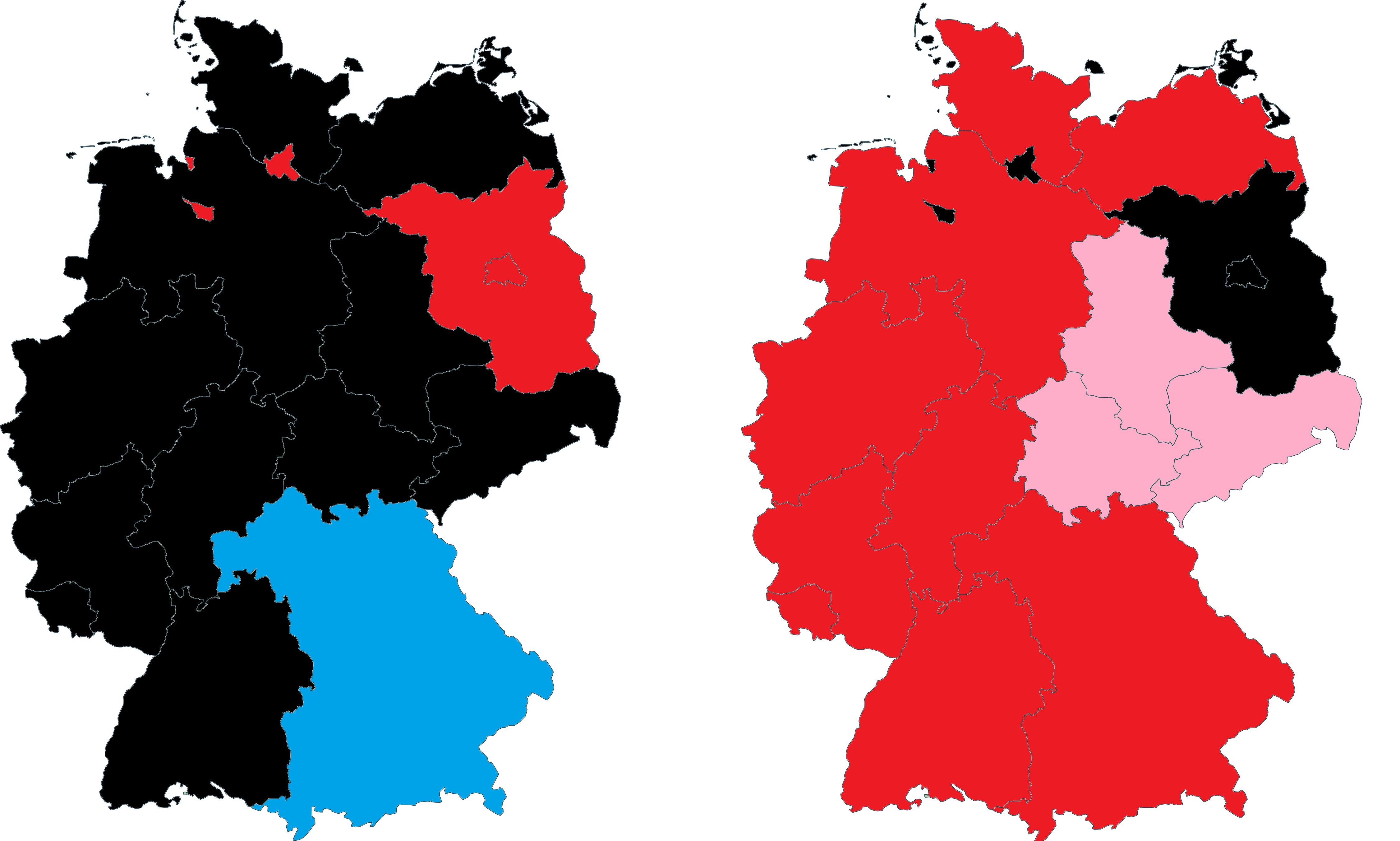 Elections européennes de 2004 en Allemagne, parti arrivé en tête par Land (1ère carte), parti arrivé en seconde position (2ème carte) Rouge : SPD Noir : CDU Bleu : CSU Rose :Die Linke